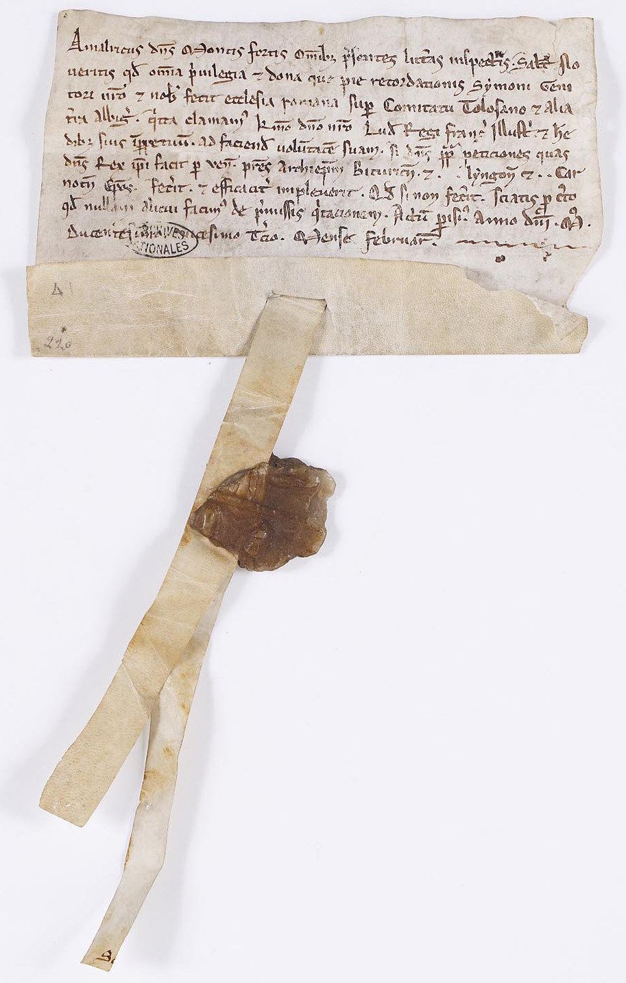 Amaury de Montfort cède au roi de France, Louis VIII, et à ses héritiers tous les droits accordés par l’Eglise à son père Simon sur le Toulousain et l’Albigeois, Février 1224.